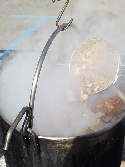 Remenant les calderes amb els ingredients